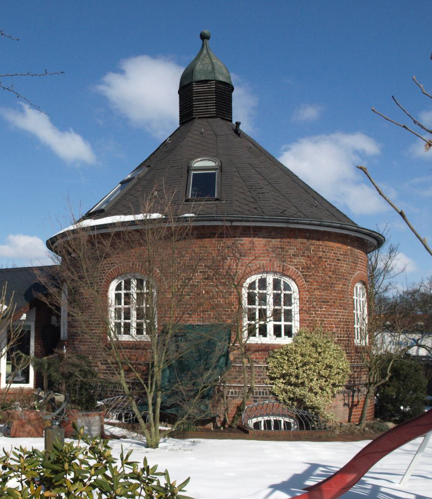 Ehem. Grundwasserwerk , Hamburg-Tonndorf, Foto 2014